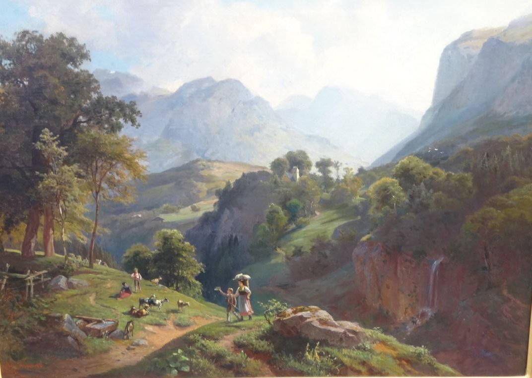 Alpenszene mit Hirten, Öl auf Leinwand